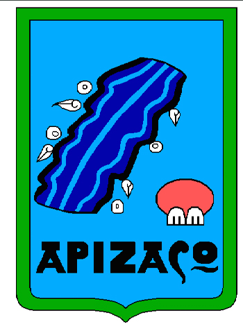 Escudo del Municipio de apizaco